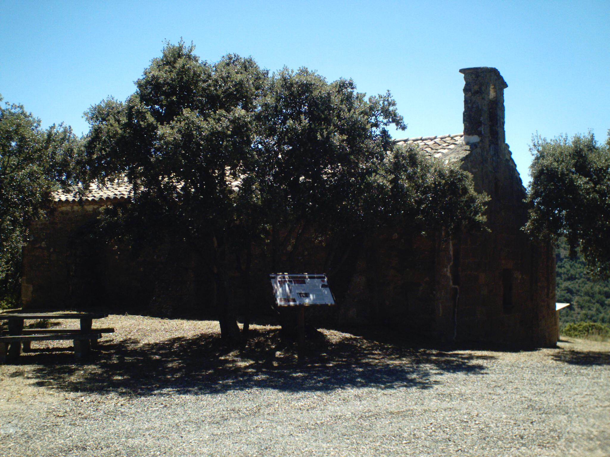 Imagen de la parte trasera de la ermita de Santa María del Monte, a un kilómetro escaso de la localidad oscense de Liesa.